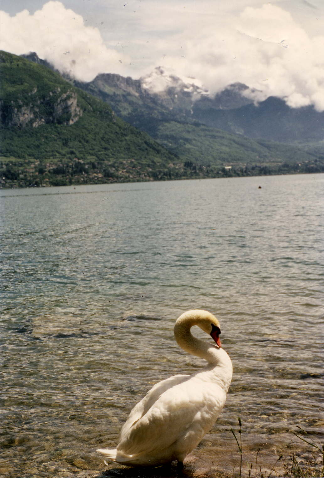 Photo par Dingy, licence GNU FDL